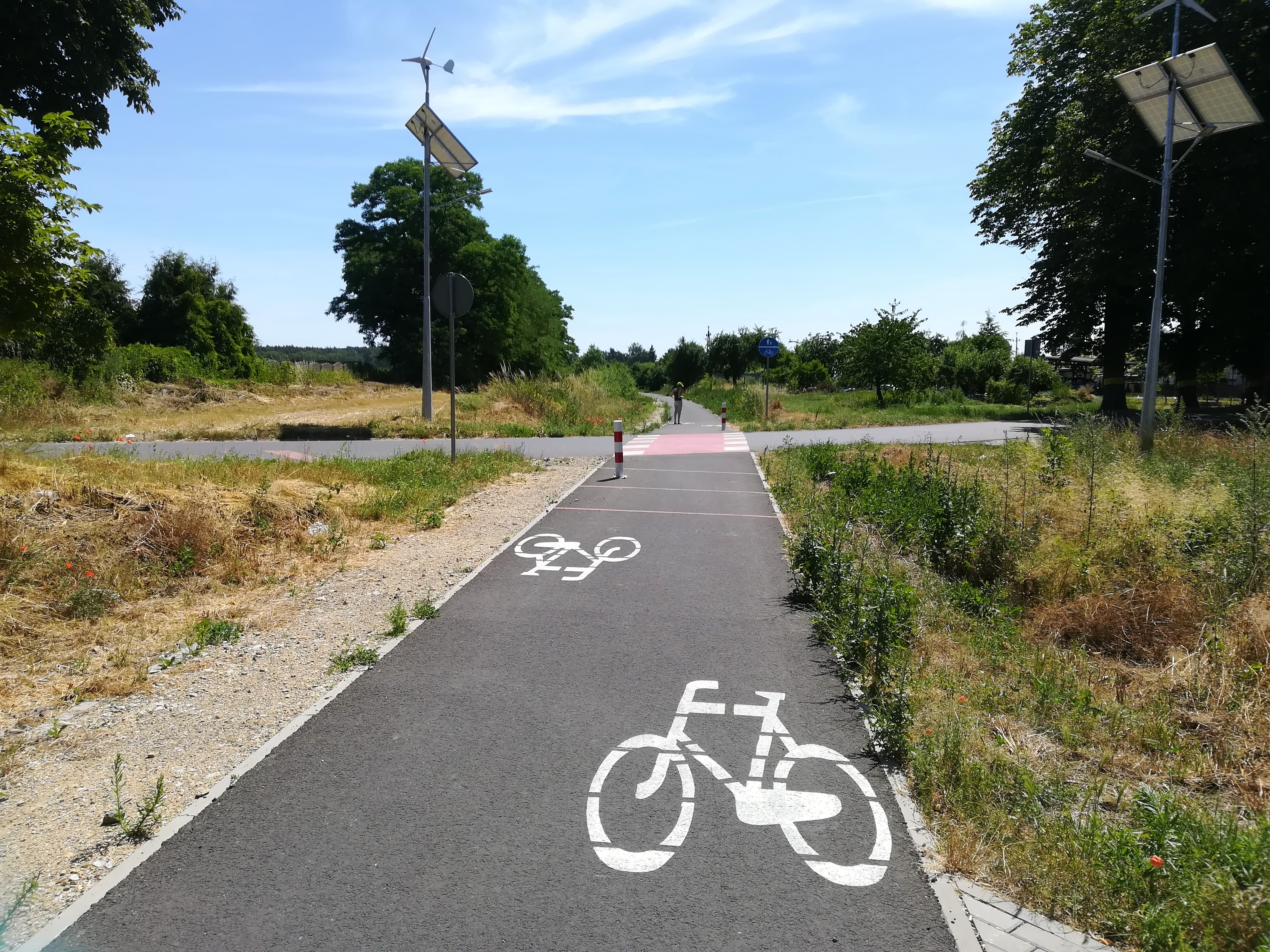 Trasa rowerowa Oborniki - Stobnica po dawnej linii nr 381 z Obornik do Wronek.